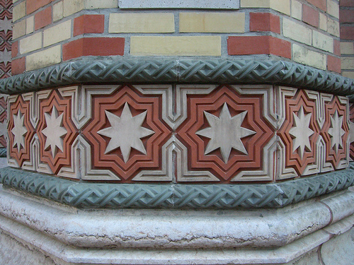 A zsinagógán körbefutó kerámiaminta (Dohány utcai zsinagóga, Budapest)